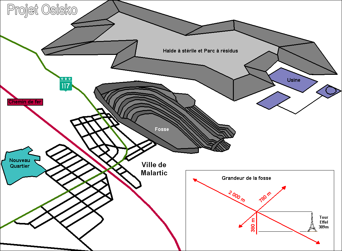 Projet Osisko à Malartic en 3 dimensions autour de 2025 (Québec, Canada)